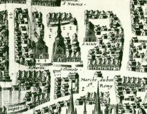 Pourtraict de la ville, cité et université de Reims. Gravé par Hugues Picart, d’après un dessin de Jacques Cellier, en 1618. Reims, BM, XXXI III C 1.